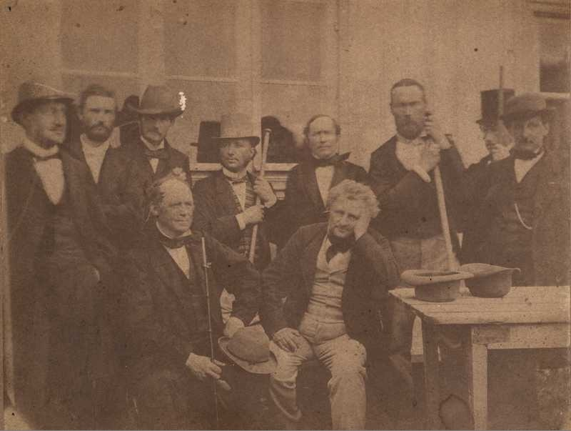 Aasmund Olavsson Vinje hos Thomas Johannessen Heftye på Sarabråten 1865